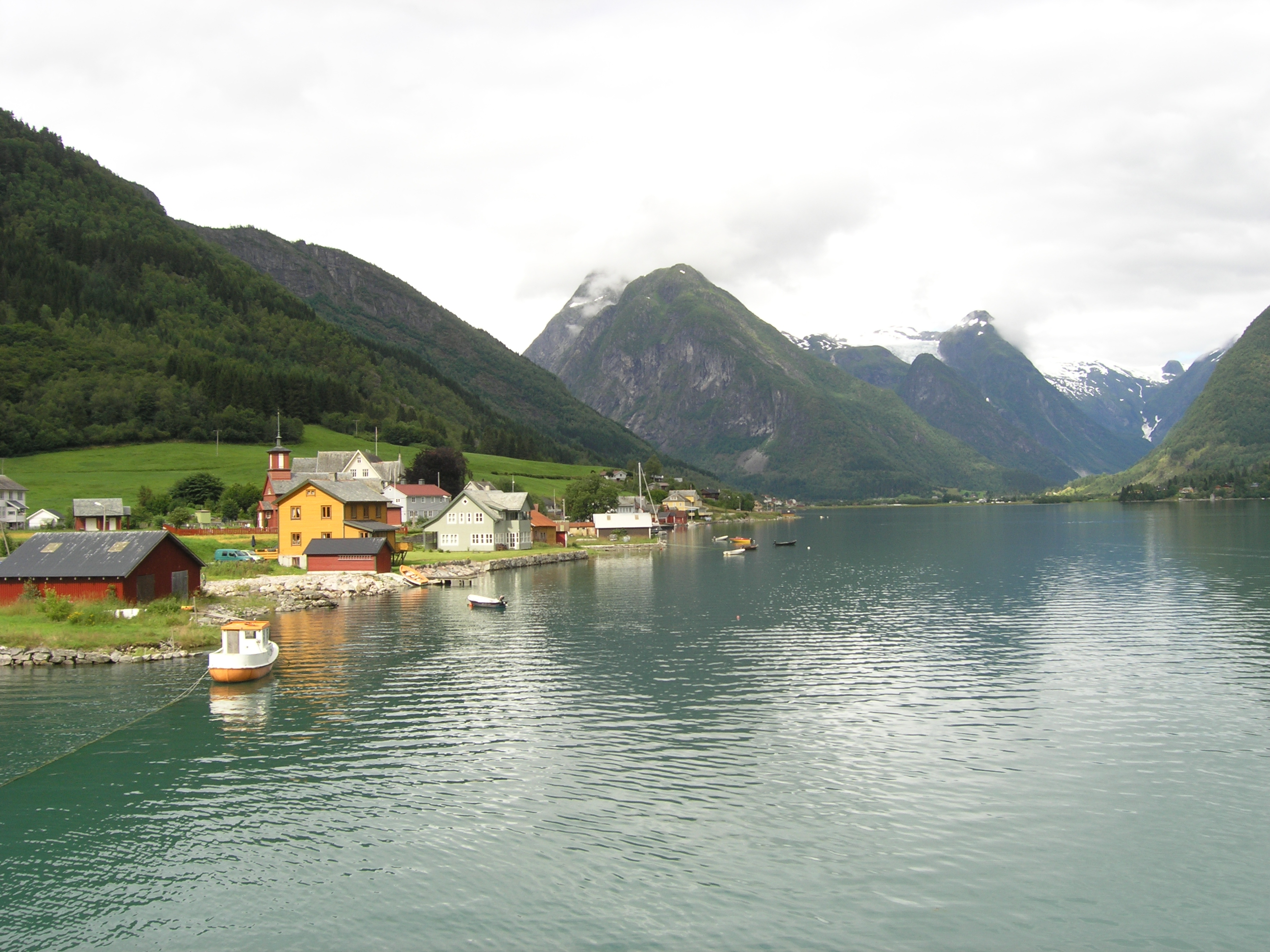 Mundal ved Fjærlandsfjorden